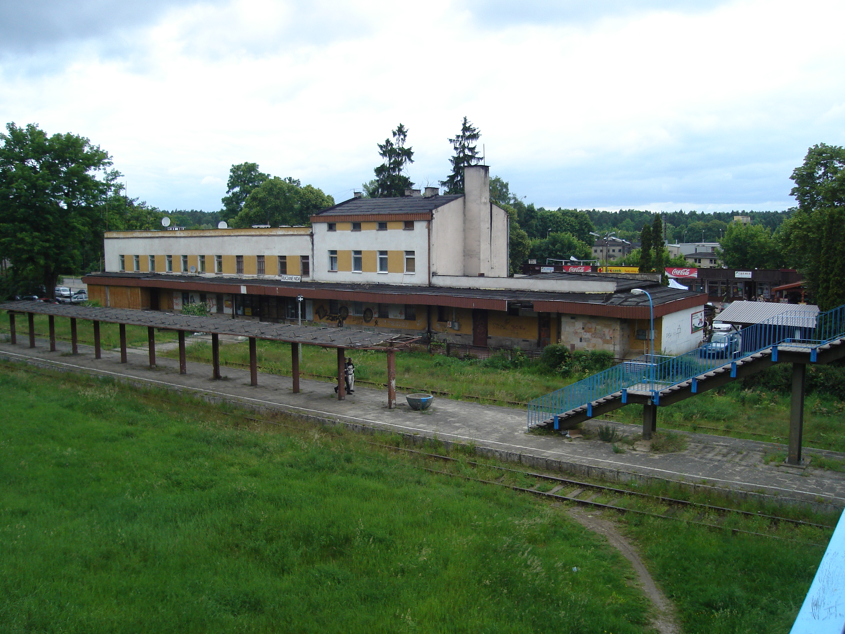 Stacja kolejowa "Ruciane-Nida"